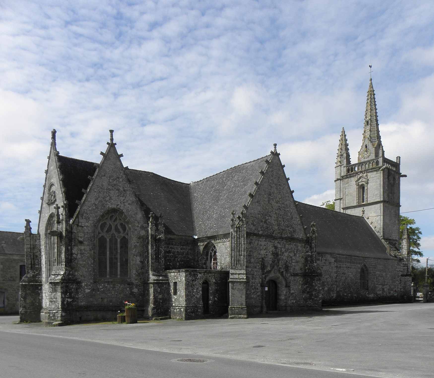 Chapelle Saint-Yves de Bubry (56). Chevet et flanc nord.